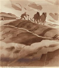 Eberhard Schrammen Pflug 1930